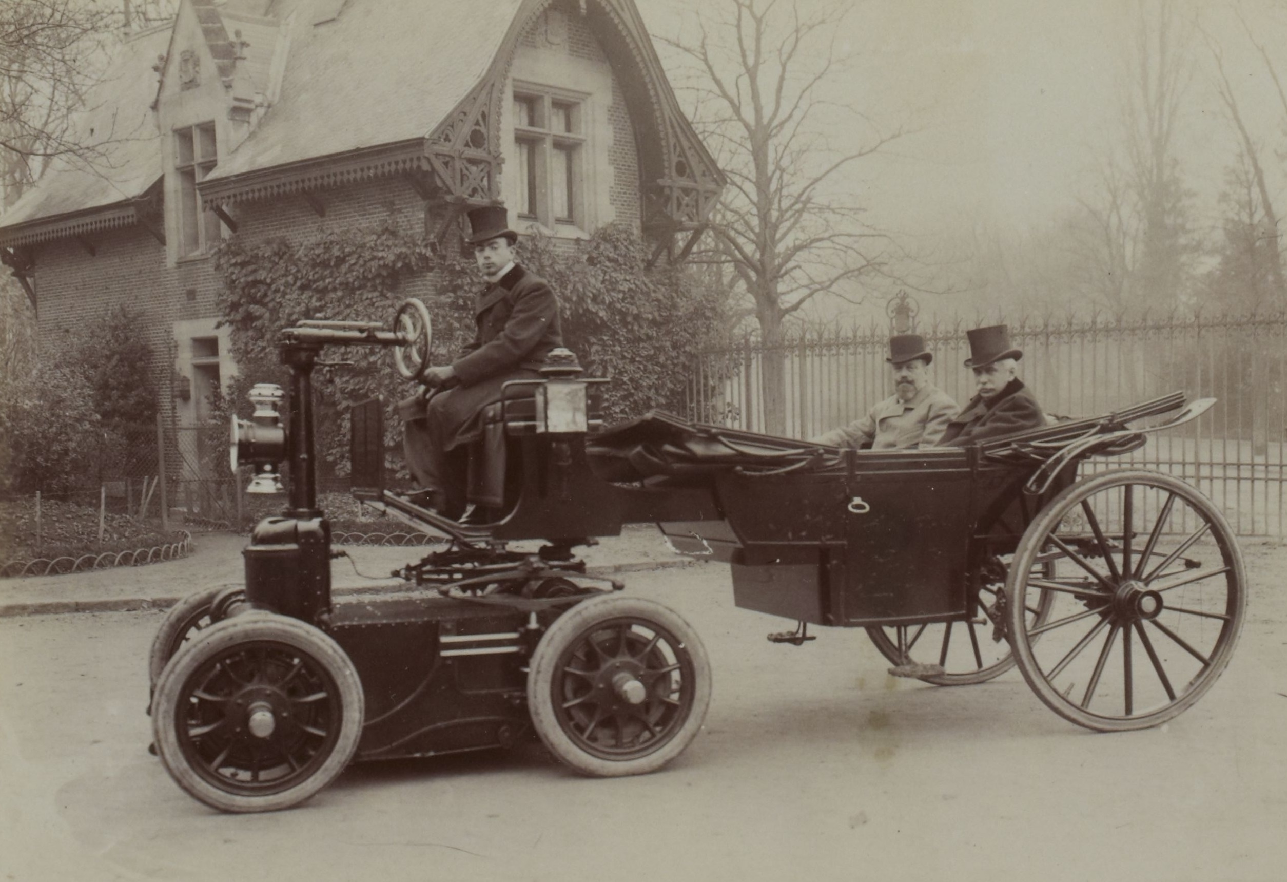 [Collection Jules Beau. Photographie sportive] : T. 10. Année 1899 / Jules Beau : F. 36. [Concours de voiturettes, Bois de Boulogne]